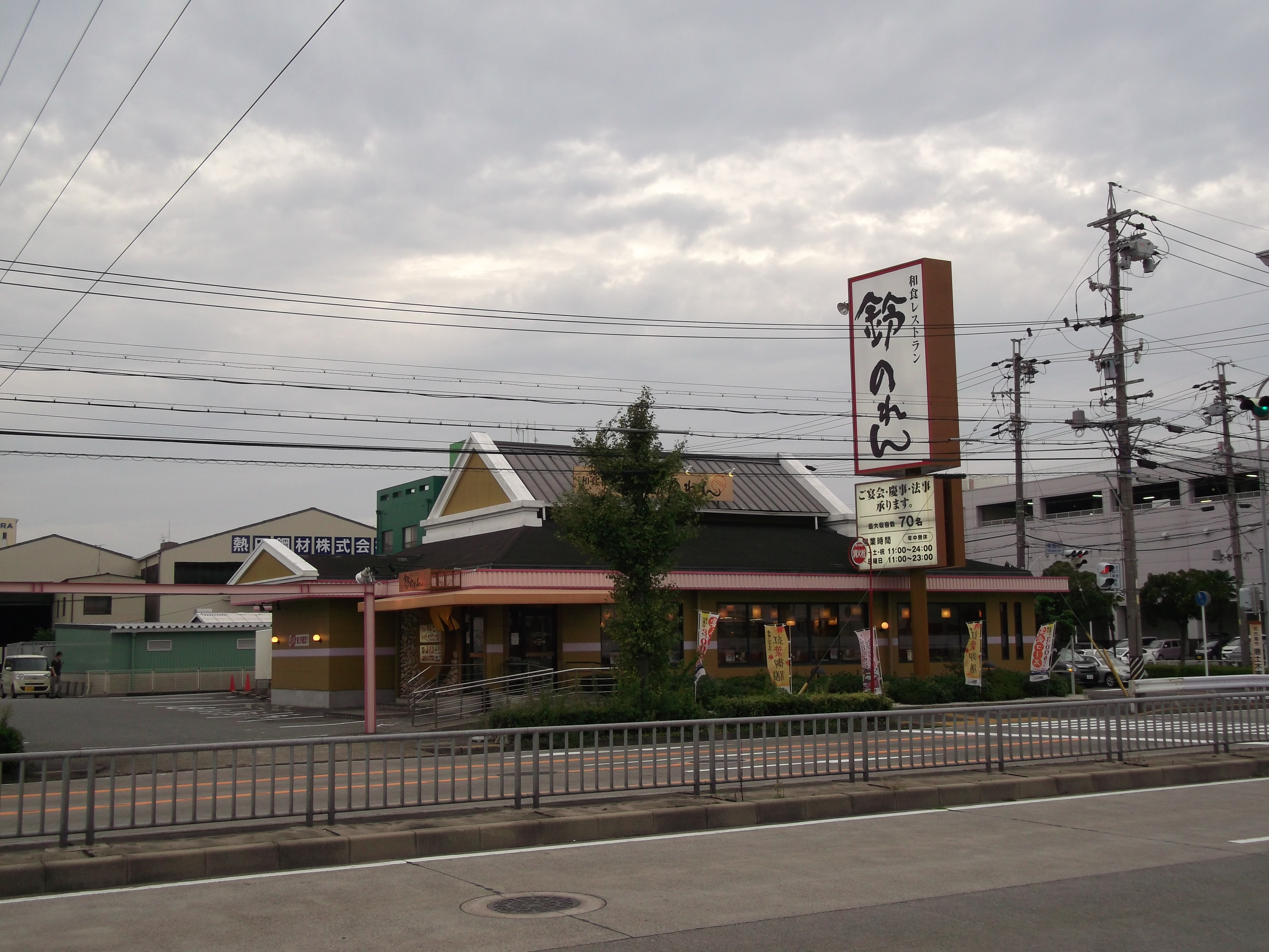 名古屋市港区の和食レストラン「鈴のれん」砂美店を東側公道南側より撮影